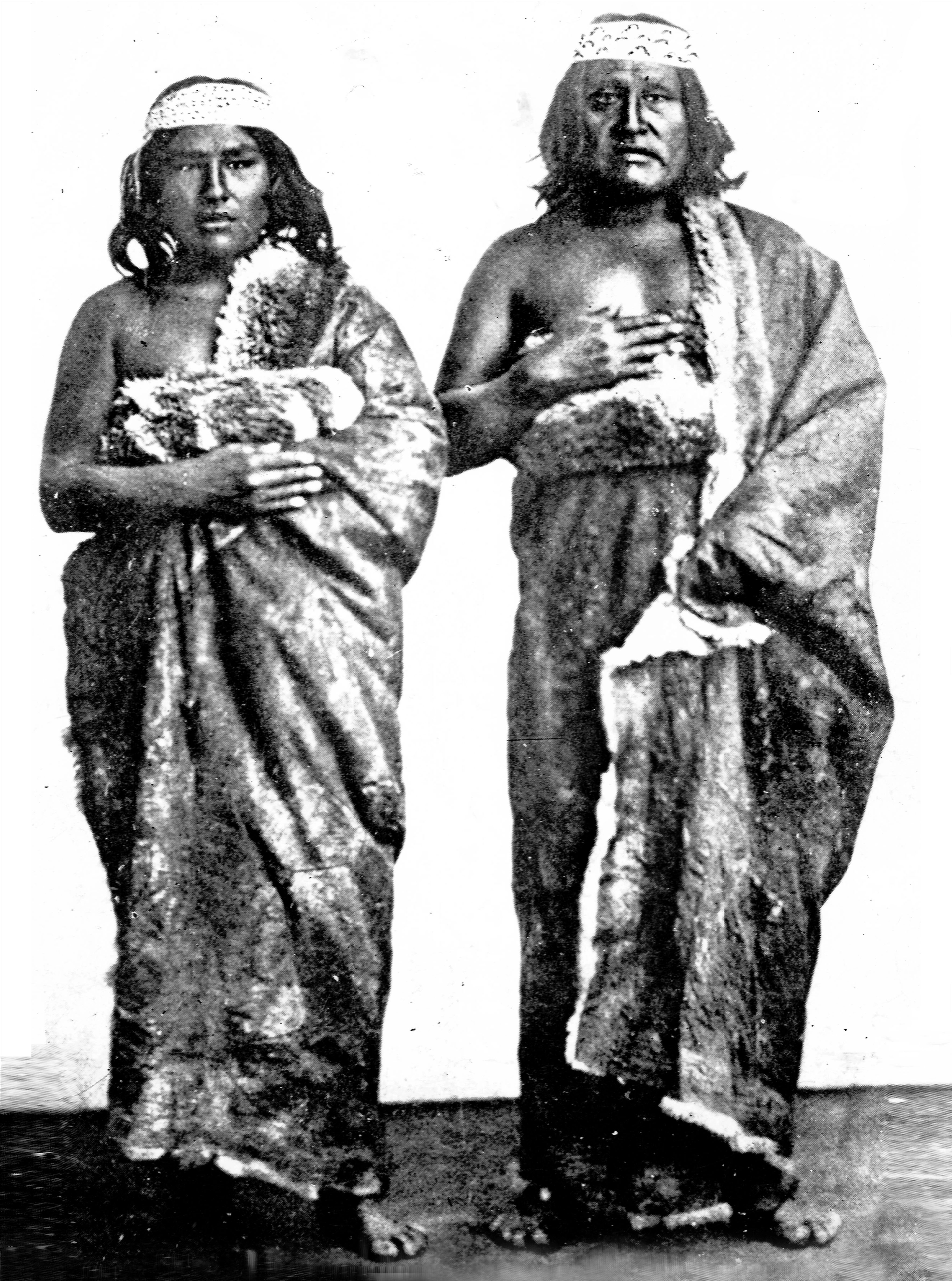 El célebre cacique Kasumiro (Casimiro Biwa) y su hijo Sam Slick, 1864. Inventario 289896. General Archive of the Nation Native nameArchivo General de la Nación ArgentinaParent institutionPoder Ejecutivo Nacional LocationBuenos Aires, ArgentinaCoordinates34° 36′ 17″ S, 58° 22′ 14″ W Established28 August 1821Web pageAGNAuthority control : Q2860529 VIAF: 158621023 ISNI: 0000 0001 2375 5869 LCCN: n82144709 NKC: kn20121211004 WorldCat institution QS:P195,Q2860529 This file, was provided to Wikimedia Commonsthanks to an agreement between the General Archive of the Nation of Argentina and Wikimedia Argentina.